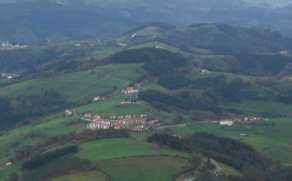 Vista general de Abalcisqueta. Vista general de Albastzisketa, Guipúzcoa, País Vasco, España.